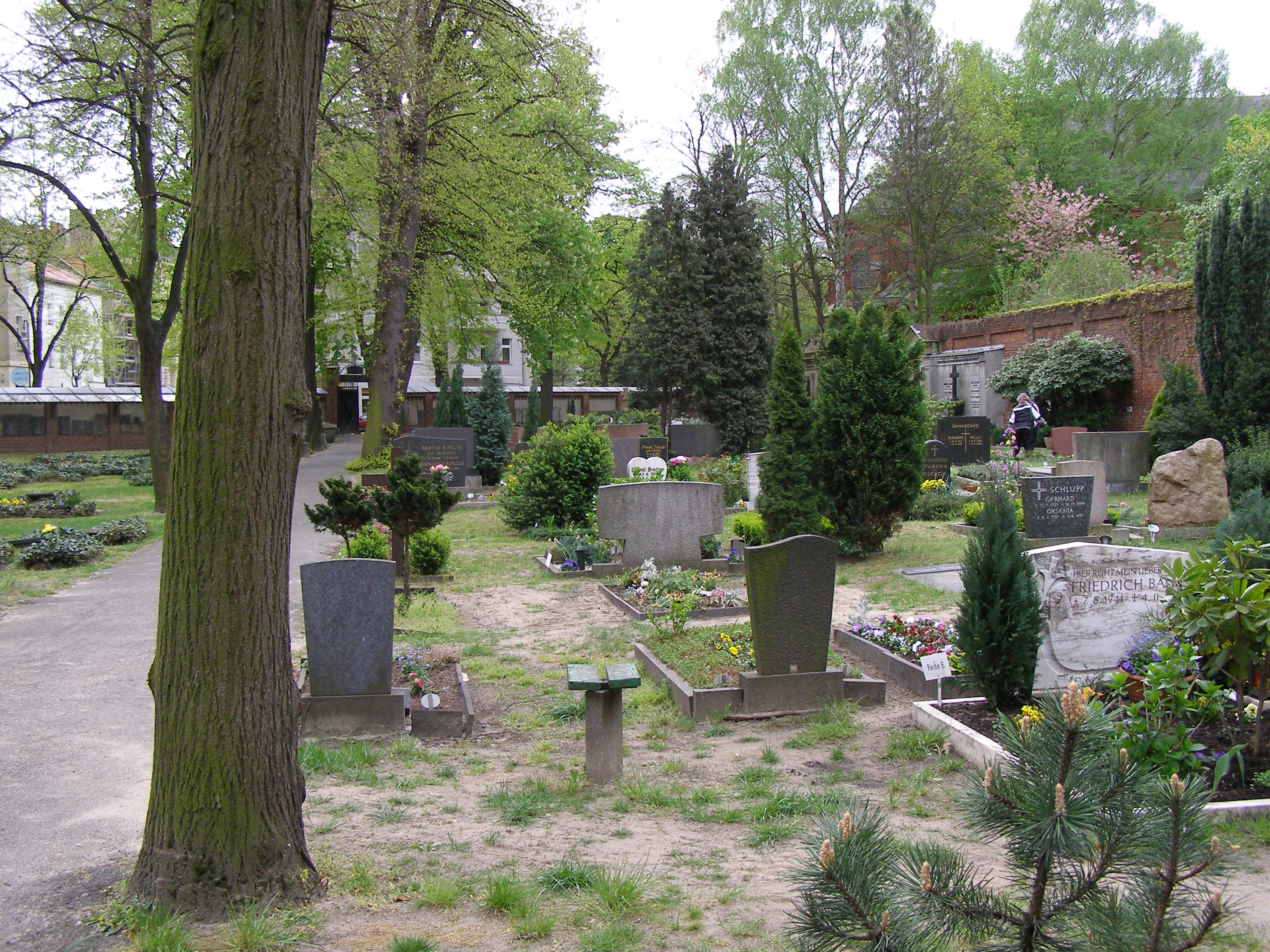 Berlin, Böhmisch-Rixdorf, Böhmisches Gottesacker Berlin, Bohemian Rixdorf, Bohemian Cemetery Berlín, Český Rixdorf, Český hřbitov